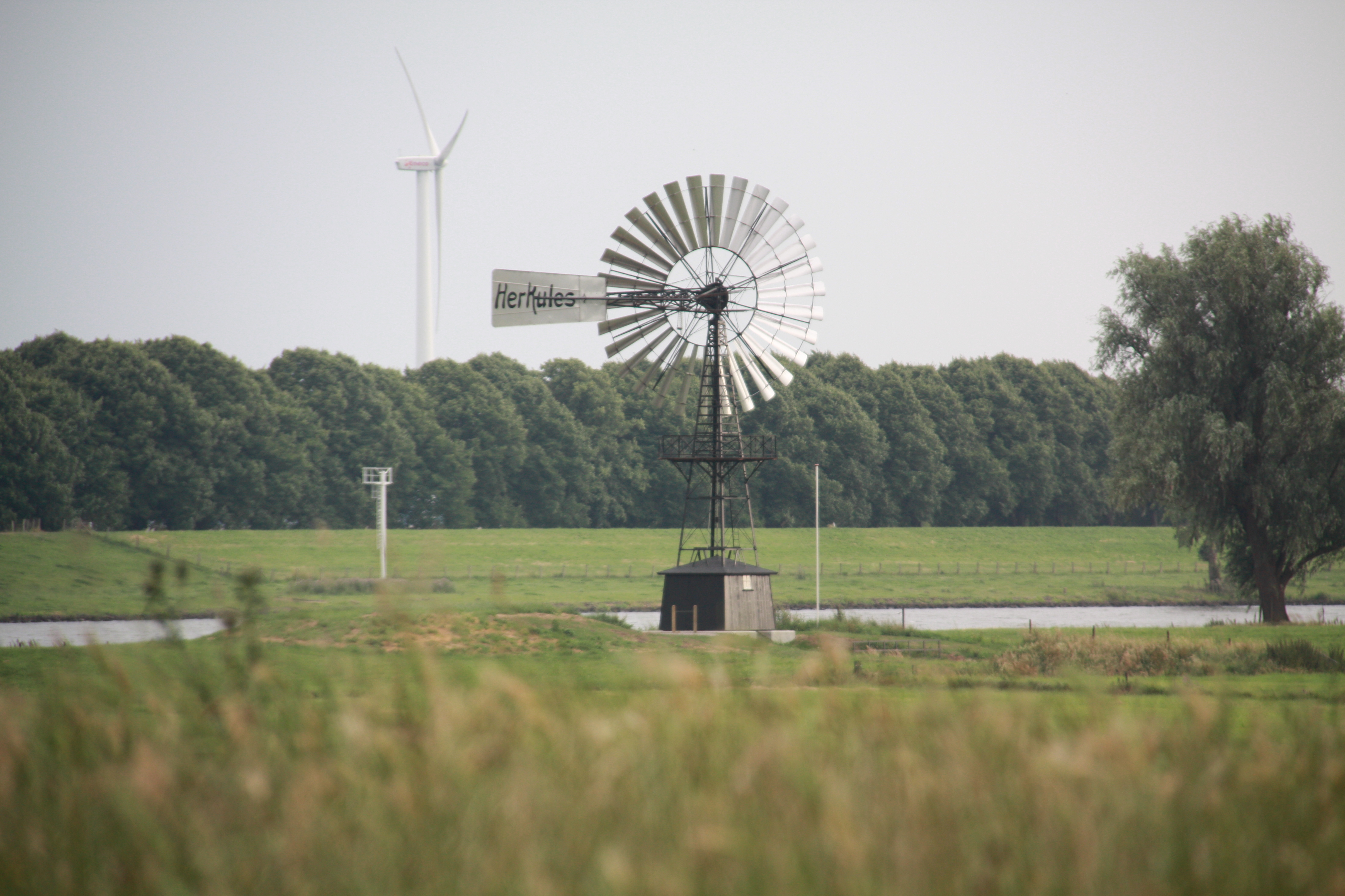 Schrikmolen